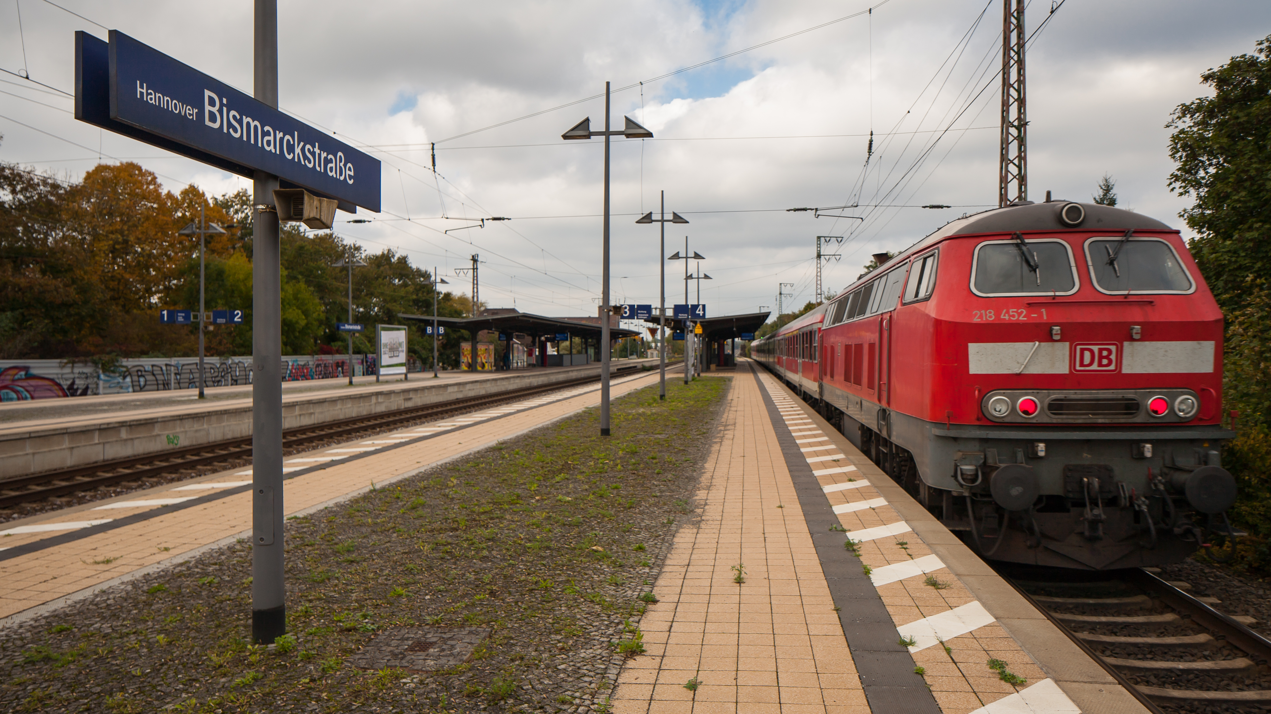 Der Bahnhof Hannover-Bismarckstraße gesehen vom Bahnsteig zwischen Gleis 3 und 4. Im Moment der Aufnahme durchfährt RE 14068 aus Bad Harzburg die Station.